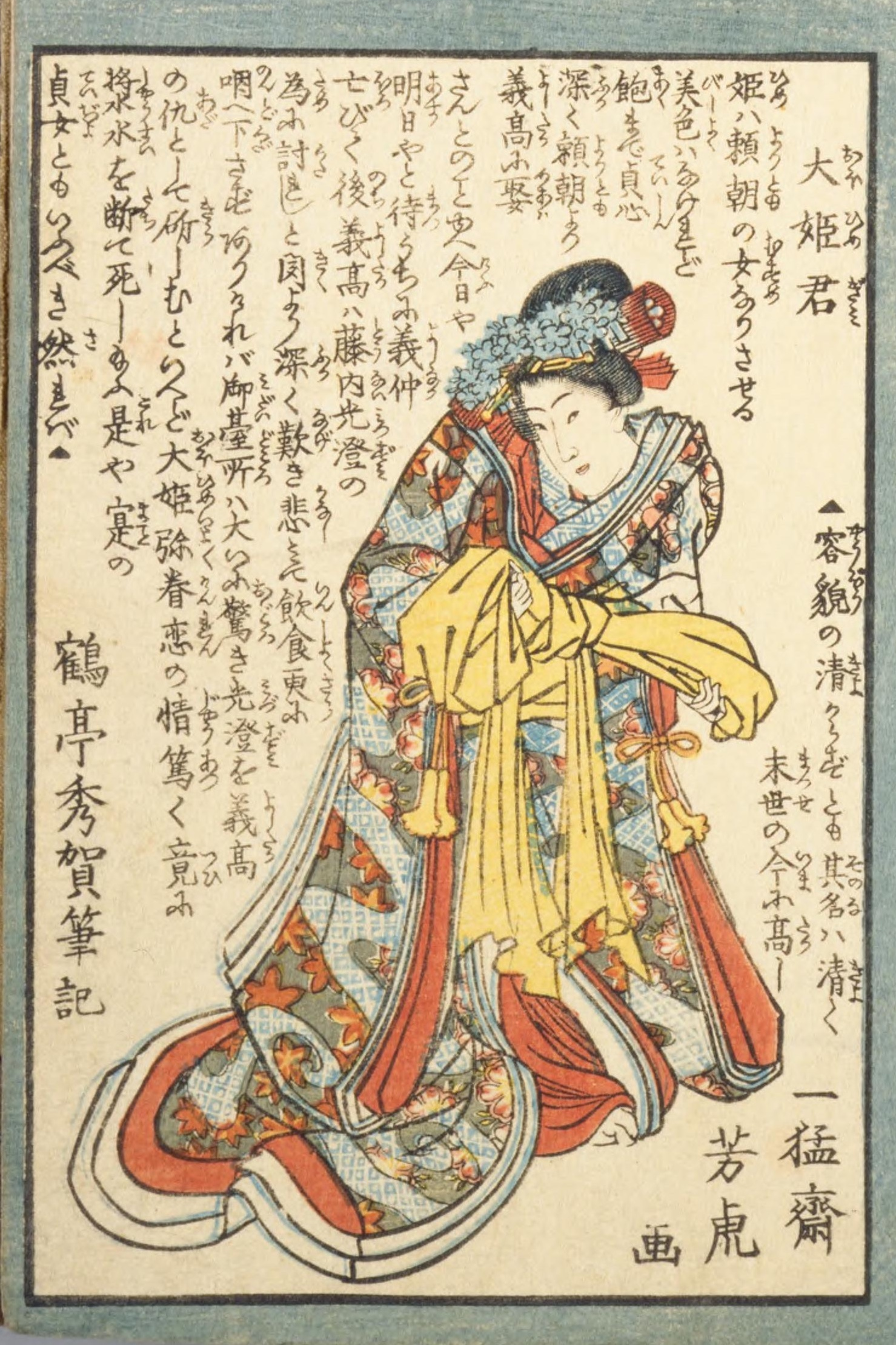 武者鑑一名人相合南伝二 大姫君